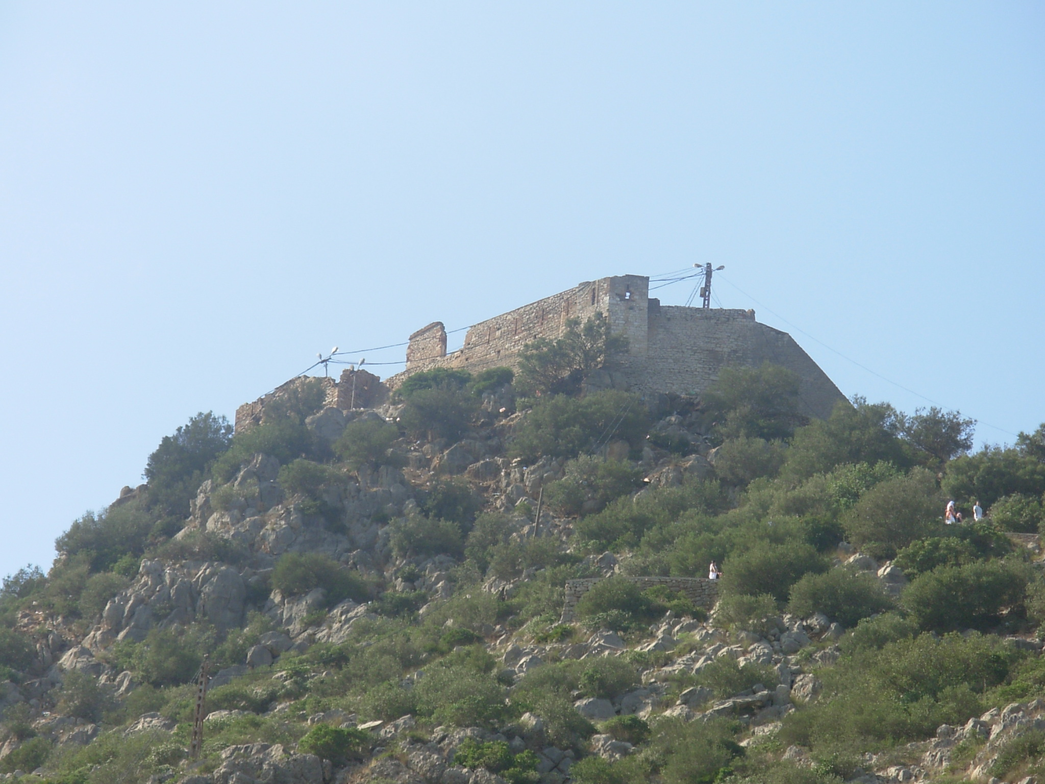 Vue du fort Yemma Gouraya (Béjaïa, Algérie)